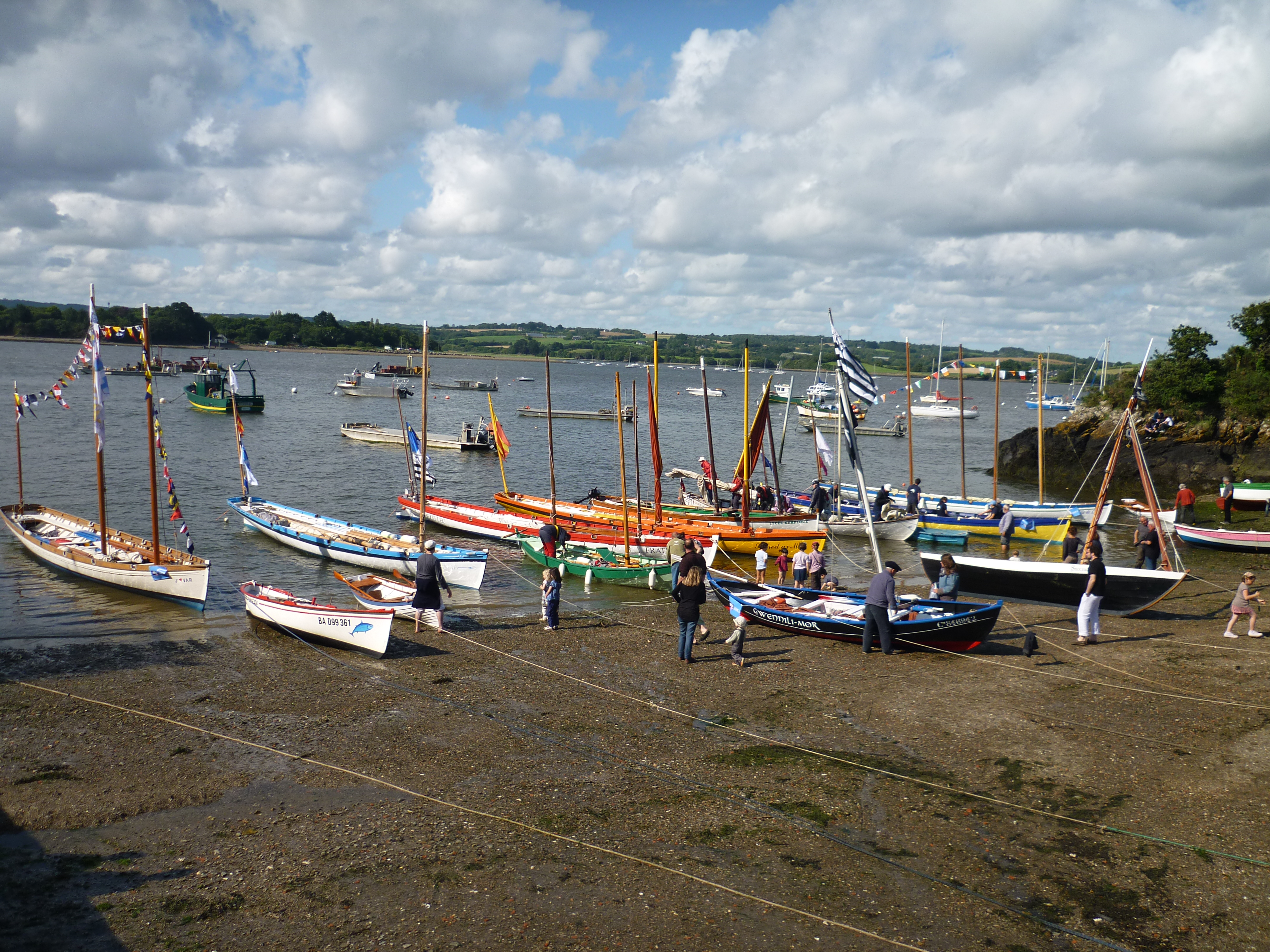 Dans le cadre des "Tonnerres de Brest 2012", rassemblement de yoles à Pors Beac'h en Logonna-Daoulas, au fond de la rade de Brest, site des 1ères Fêtes Maritimes des années 80, avec (de gauche à droite) les yoles de Bantry : Jemvar (Toulon), Massalia (Marseille), Fraternité (Brest), Spered ar Mor (Le Guilvinec), An Erminig (Séné) et Fille de Loire (Ancenis).